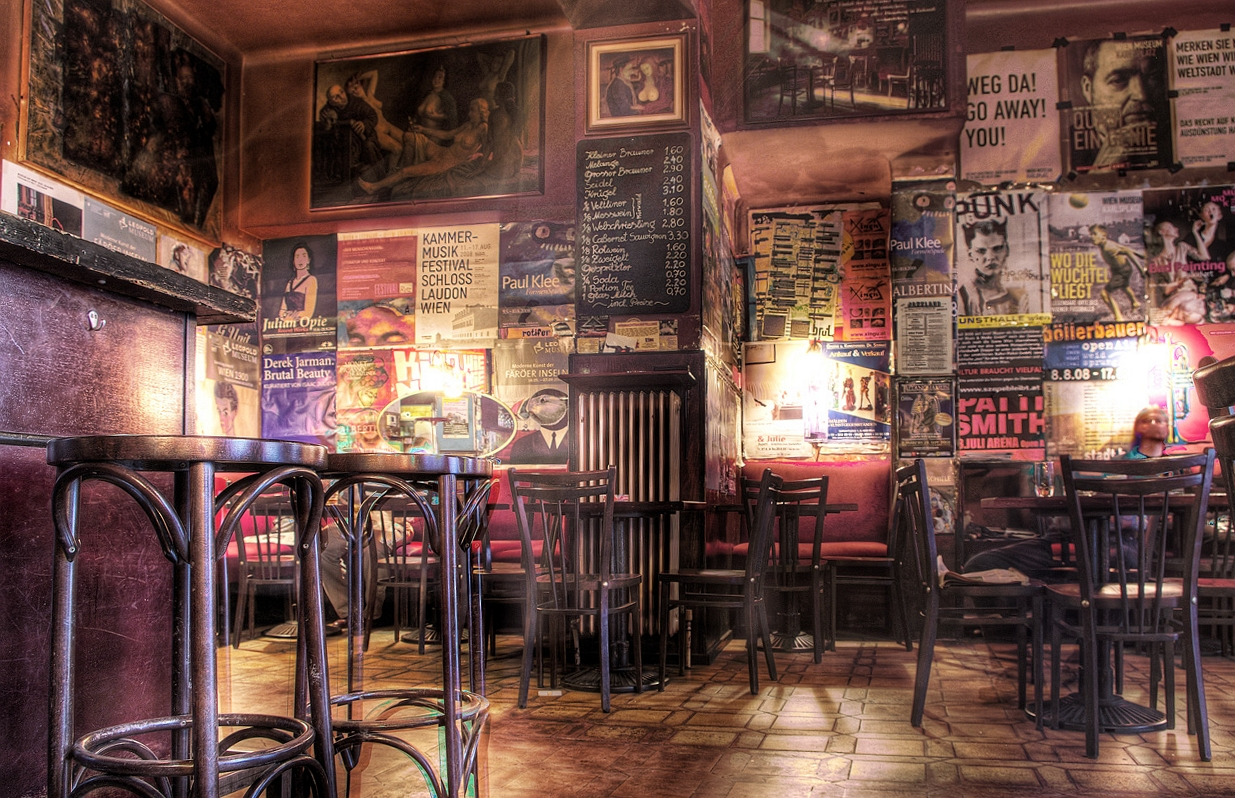 Cafe Alt Wien, Wien, Innenraum